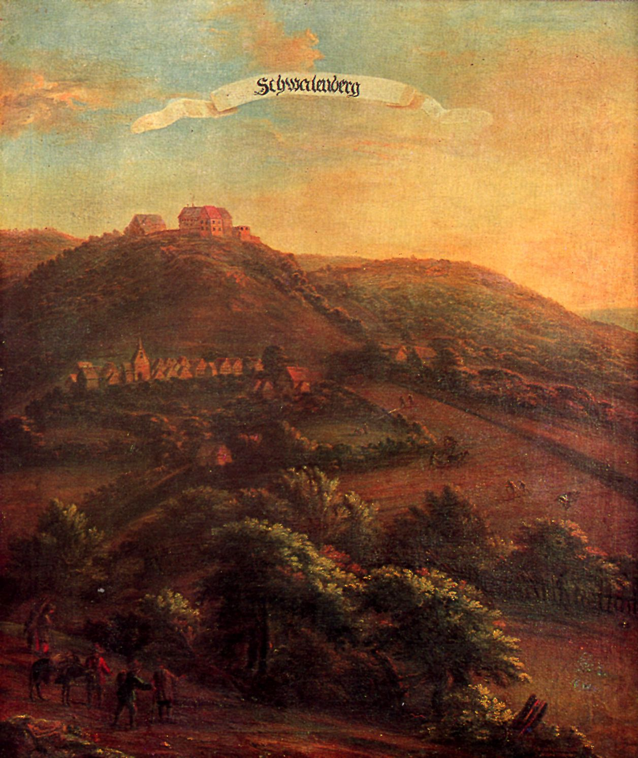 Ansicht mit Burg Schwalenberg